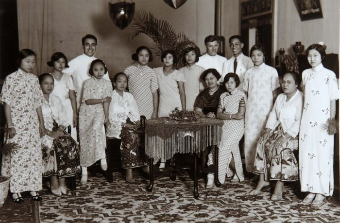 Foto. Groepsportret met onder meer leerlingen van een Rooms-Katholieke Hollands-Chinese school in Bandjermasin en missionarissen van de MSF